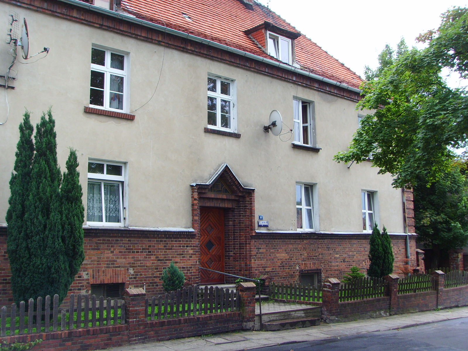 UB w Myśliborzu